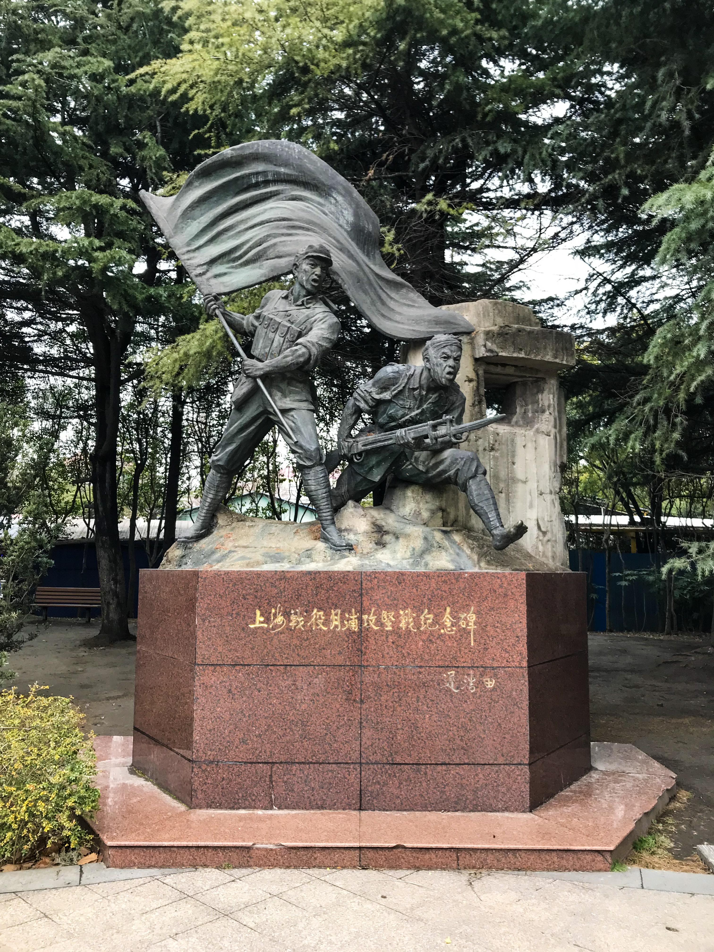 上海战役月浦攻坚战纪念碑